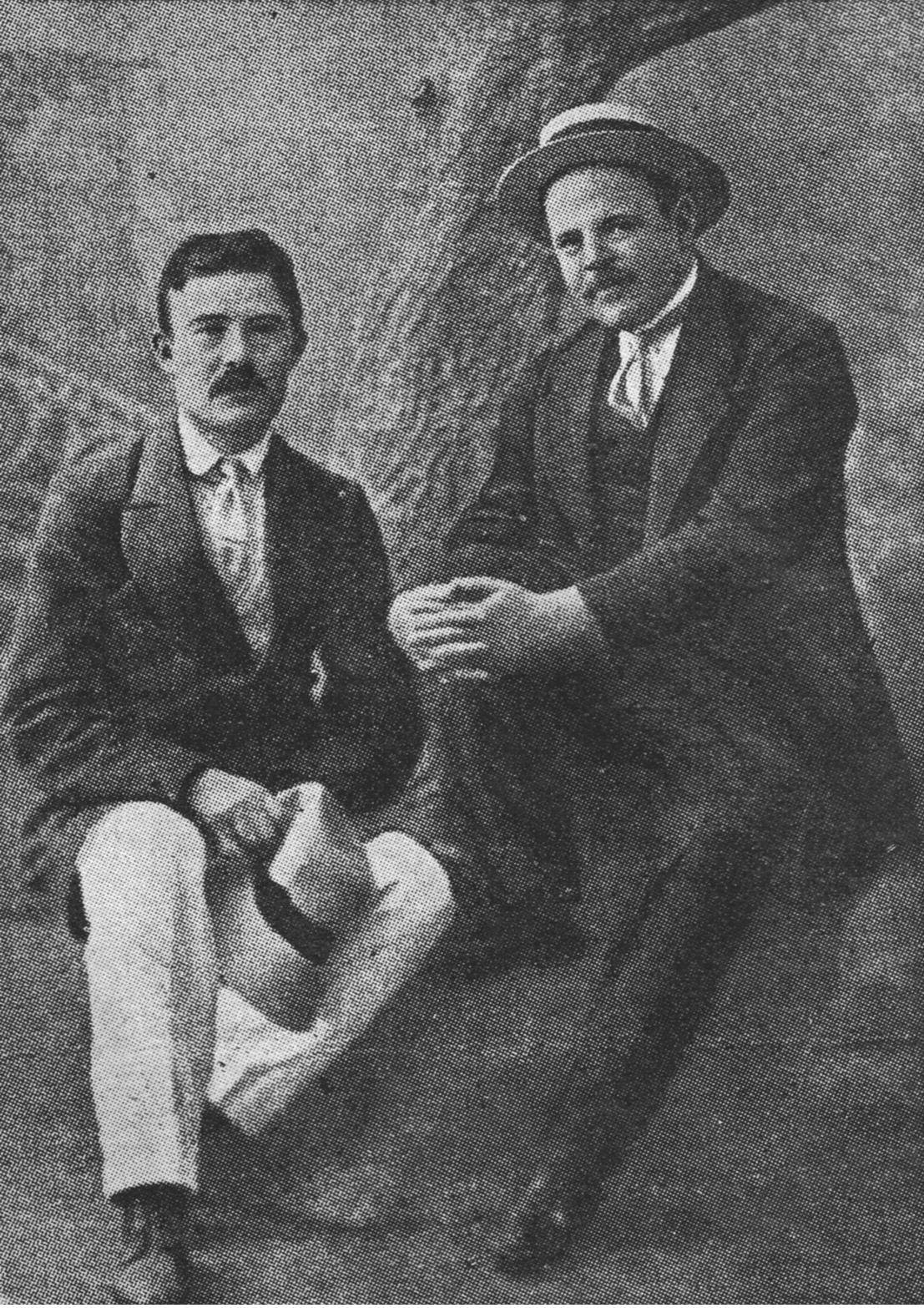 חיים נחמן ביאליק ויעקב פיכמן